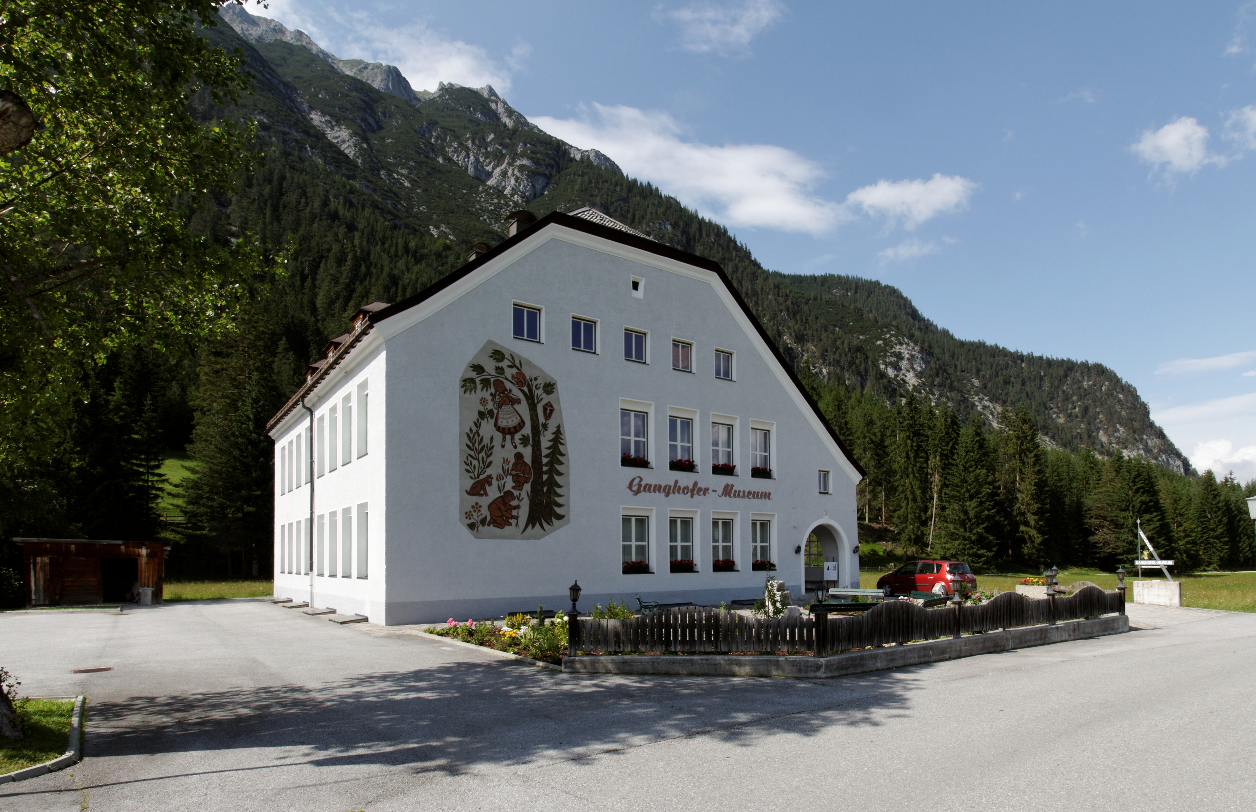 Leutasch-Kirchplatzl, Ganghofermuseum, ehemalige Volksschule This media shows the remarkable cultural object in the Austrian state of Tyrol listed by the Tyrolean Art Cadastre with the ID 54189. (on tirisMaps, pdf, more images on Commons)